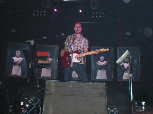 La casa azul durante uno de sus conciertos